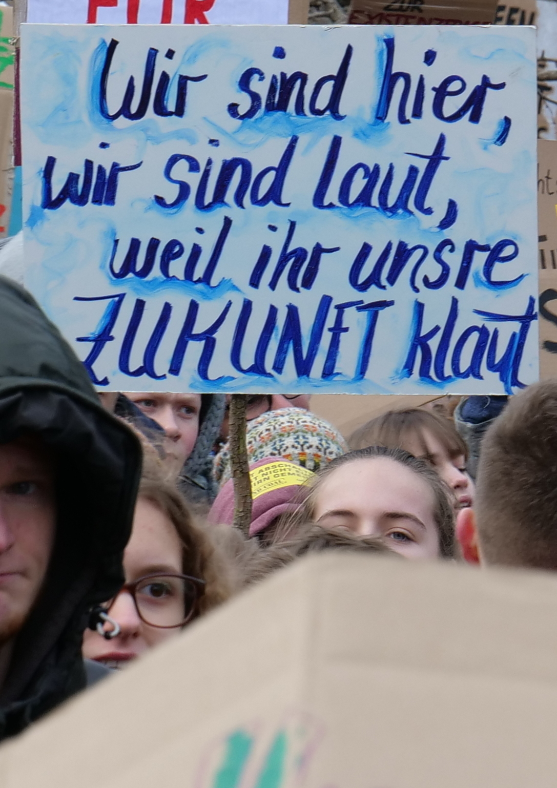 Auftaktkundgebung der FridaysForFuture Demonstration am 25. Januar 2018 in Berlin.